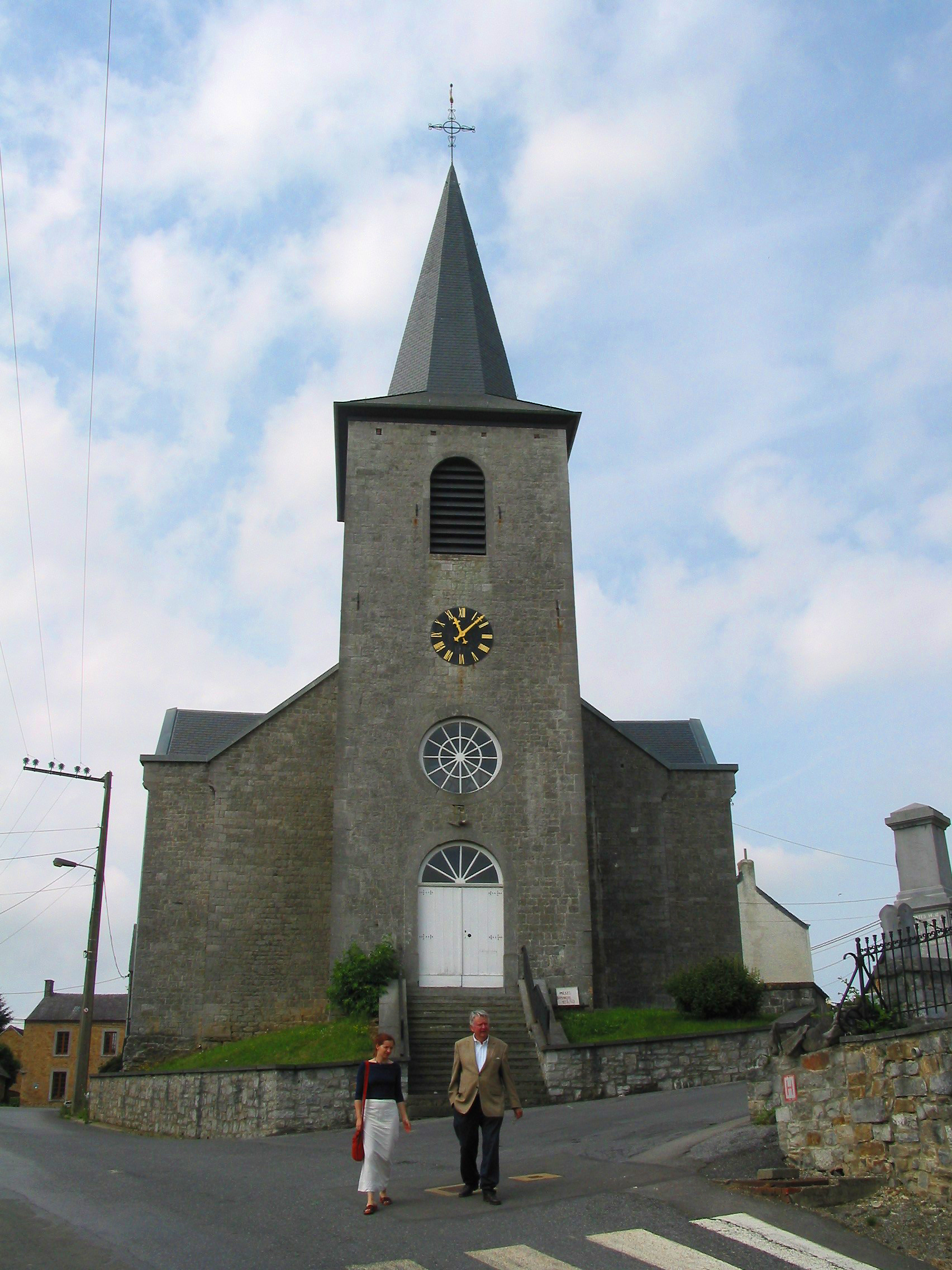 Schaltin (Belgique), l'église Saint-Remacle (1850).